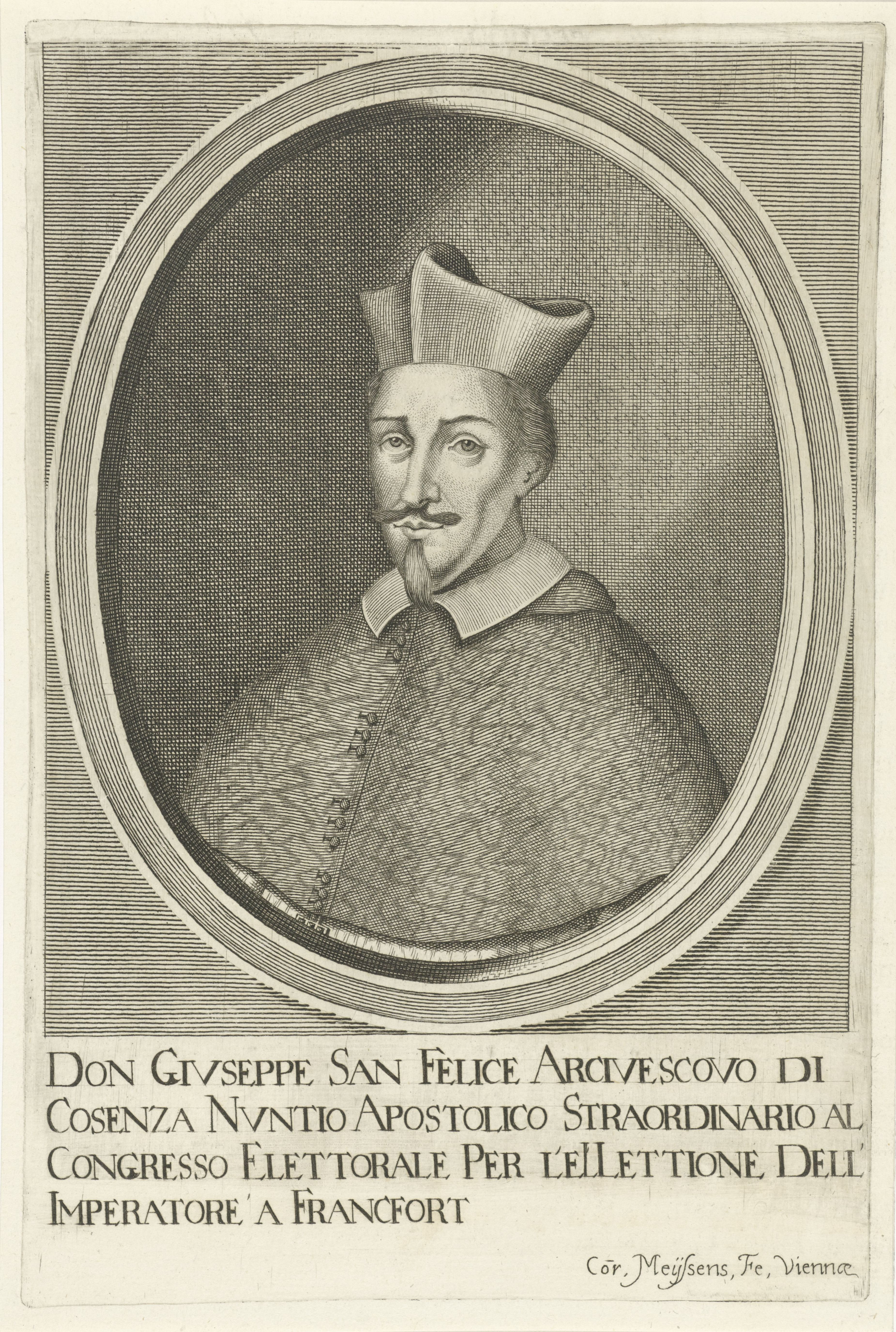 IdentificatieTitel(s): Portret van Giuseppe Francisco Maria SanfeliceObjecttype: prent Objectnummer: RP-P-1905-1201Opschriften / Merken: verzamelaarsmerk, verso, gestempeld: Lugt 2228opschrift, verso, handgeschreven in potlood: ‘Drug 18022’Omschrijving: Portret van Giuseppe Francisco Maria Sanfelice, aartsbisschop van Cosenza. Onderaan in de marge zijn titel en functie in het Italiaans.VervaardigingVervaardiger: prentmaker: Cornelis Meyssens (vermeld op object)uitgever: Giovanni Battista Hacque (mogelijk)Plaats vervaardiging: WenenDatering: 1670 - 1674Fysieke kenmerken: gravureMateriaal: papier Techniek: graveren (drukprocedé)Afmetingen: plaatrand: h 245 mm × b 162 mmToelichtingPrent mogelijk gebruikt in: Gualdo Priorato, Galeazzo. Historia di Leopoldo Cesare, (...). 3 dln. Wenen, Giovanni Battista Hacque, 1670-1674.OnderwerpWie: Giuseppe Francisco Maria SanfeliceVerwerving en rechtenVerwerving: aankoop 1905Copyright: Publiek domein